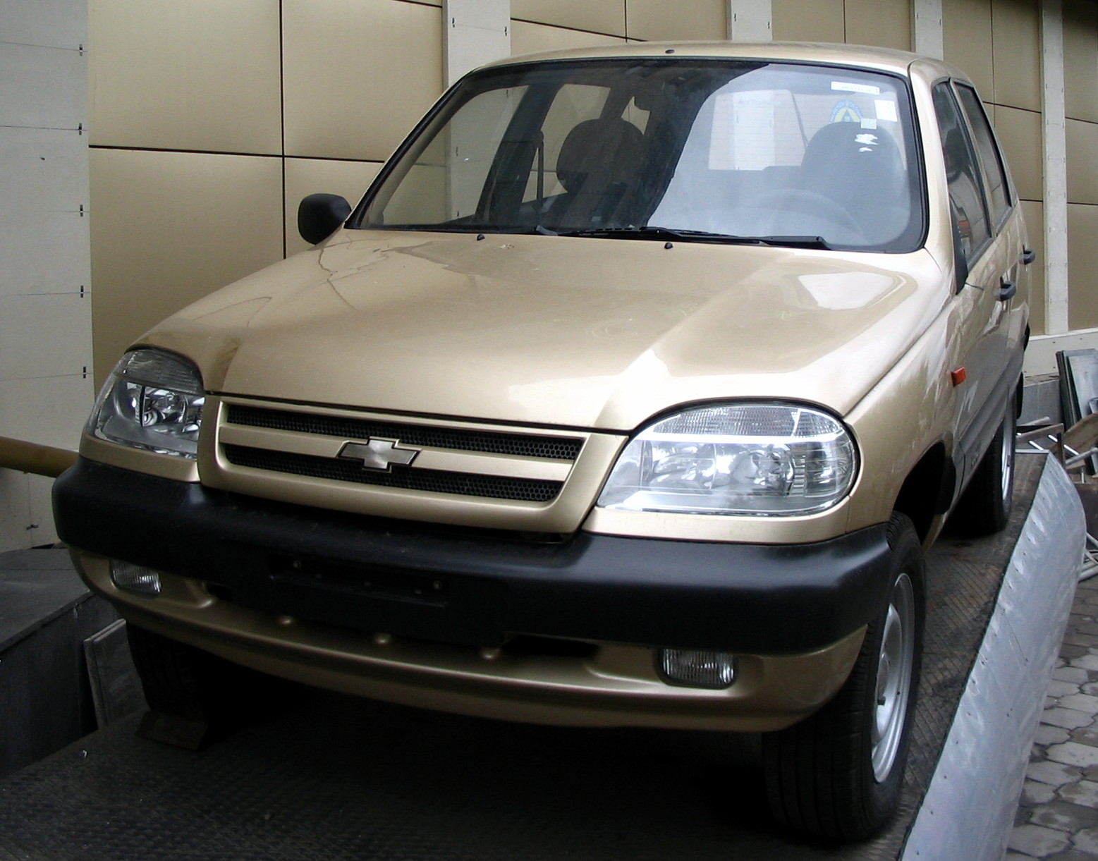 Chevrolet Niva in Karaganda, Kasachstan